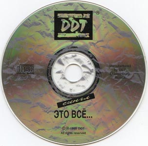 Лицевая сторона CD ("cd-label") - сингла "Это всё... Сингл" российской рок-группы ДДТ. Содержит логотип группы, название сингла и техническую информацию.